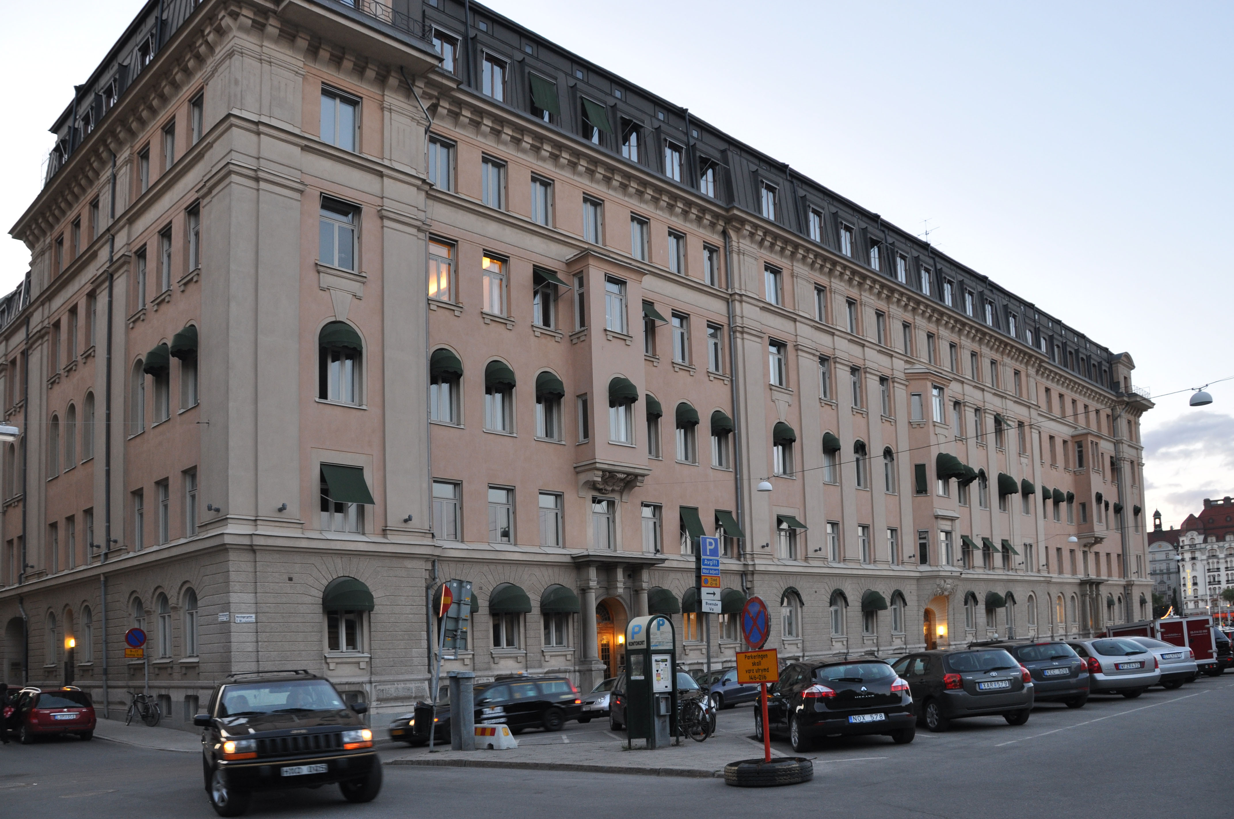 Hovslagargatan 5, Blasieholmen, Stockholm